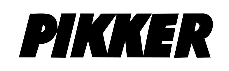 Pikker (ajakiri) päis alates 1972